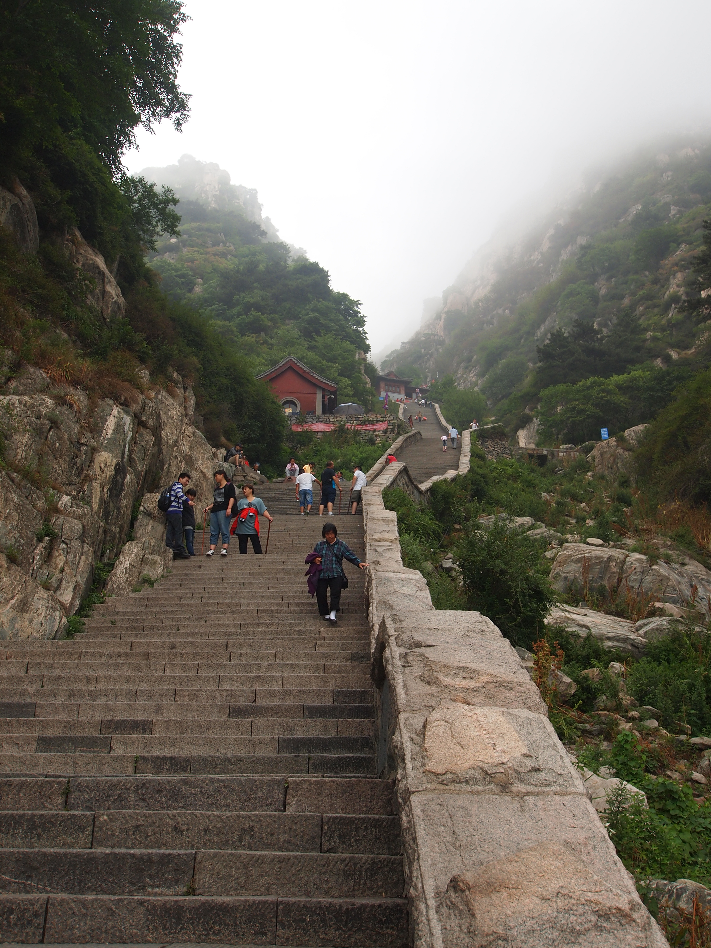 泰山十八盘 - Eighteen Twistings - 2012.06